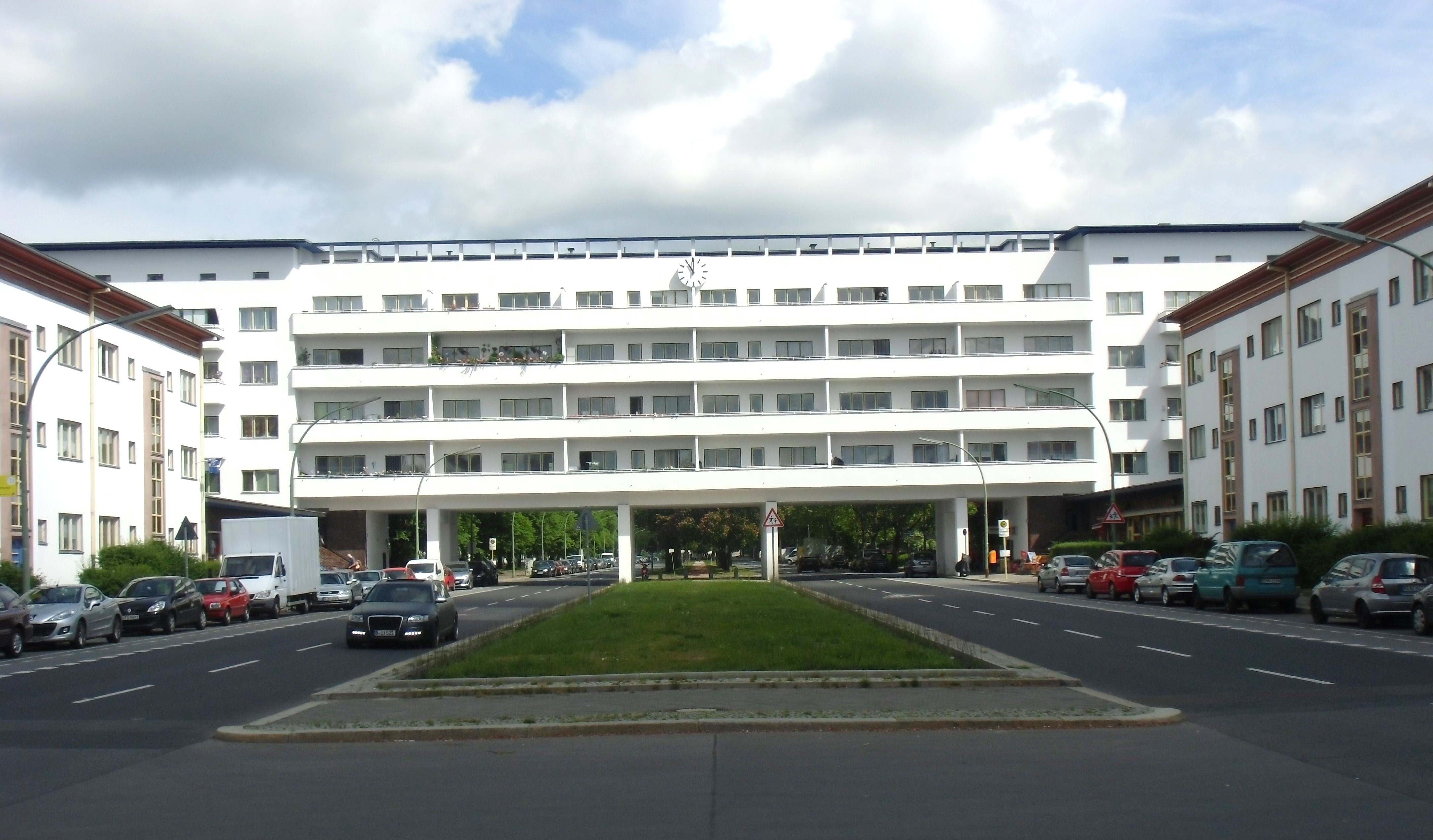 Das Laubenganghaus in der Aroser Allee ist Teil der denkmalgeschützten Anlage der "Weißen Stadt", erbaut 1929-1931, die zum Unesco-Weltkulturerbe gehört